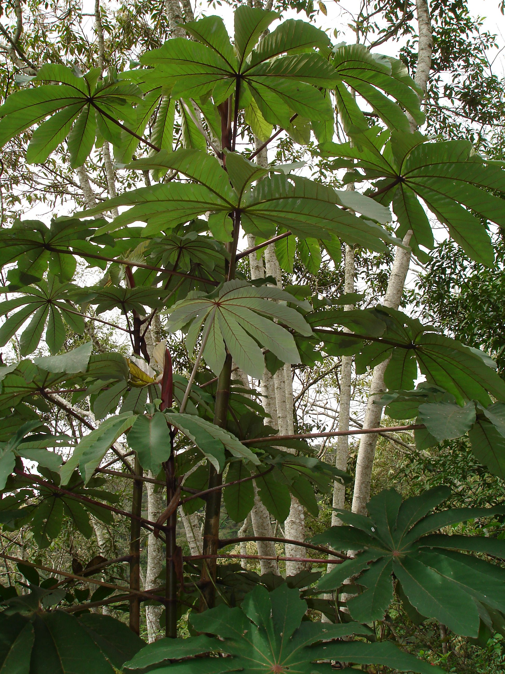 Red Embauba (Cecropia glazoui), from Petropolis,Rio de Janeiro, Atlantic rainforest, Brazil